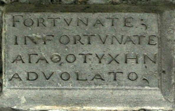 Plaque fixée sur les voûtes de l'ancienne mairie d'Agde (Hérault - France) FORTVNATE INFORTVNATE ΑΓΑΘΟΤΥΧHΝ ADVOLATO (Heureux ou malheureux, accourez sans retard vers la Bonne Fortune) Cette plaque, probablement antérieure à 1526, proviendrait de l'ancienne maison consulaire d'Agde (J. Picheire, Histoire d'Agde, 1961).